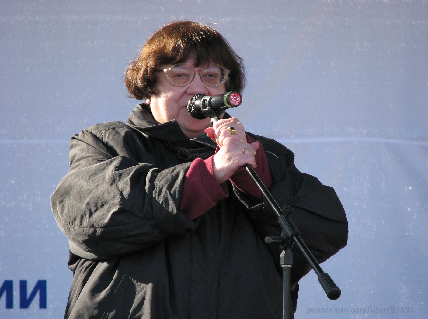 Диссидент, политик, публицист, правозащитница Валерия Ильинична Новодворская на митинге 9 октября 2010 года на Болотной набережной в Москве.